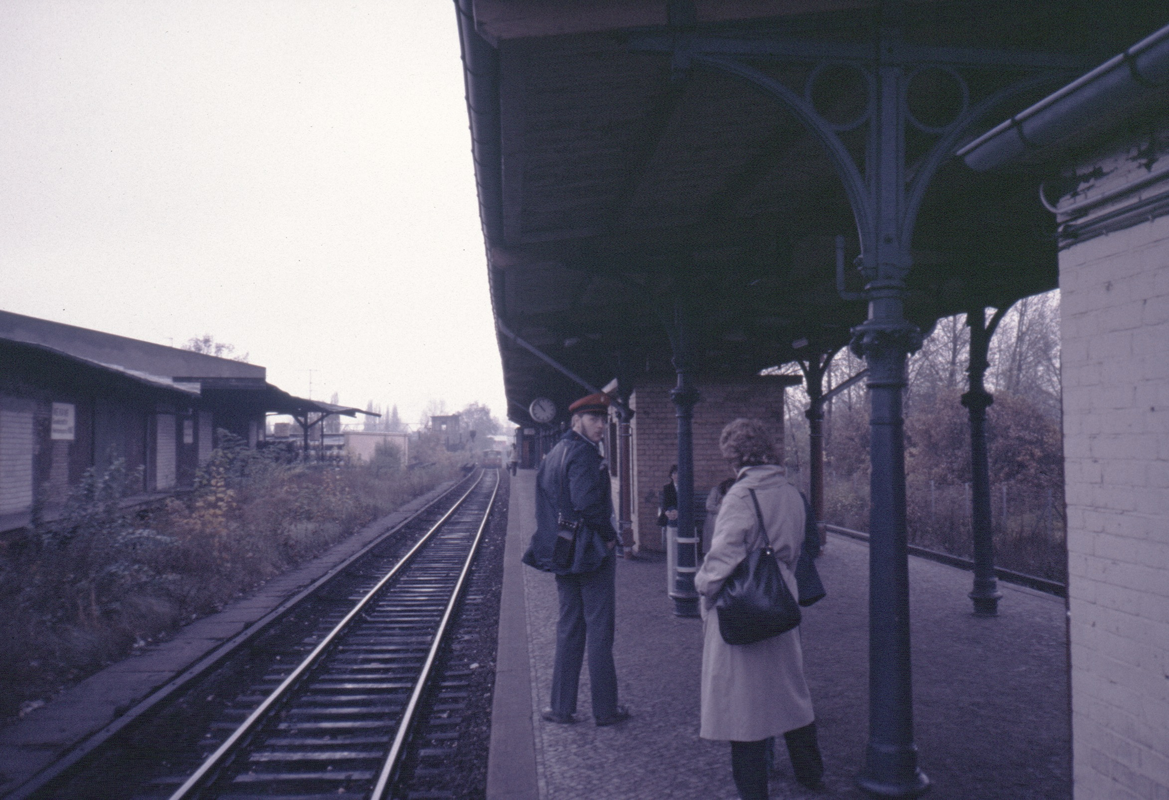 Bahnhof Berlin Yorckstraße (Anhalter und Dresdener Bahn)